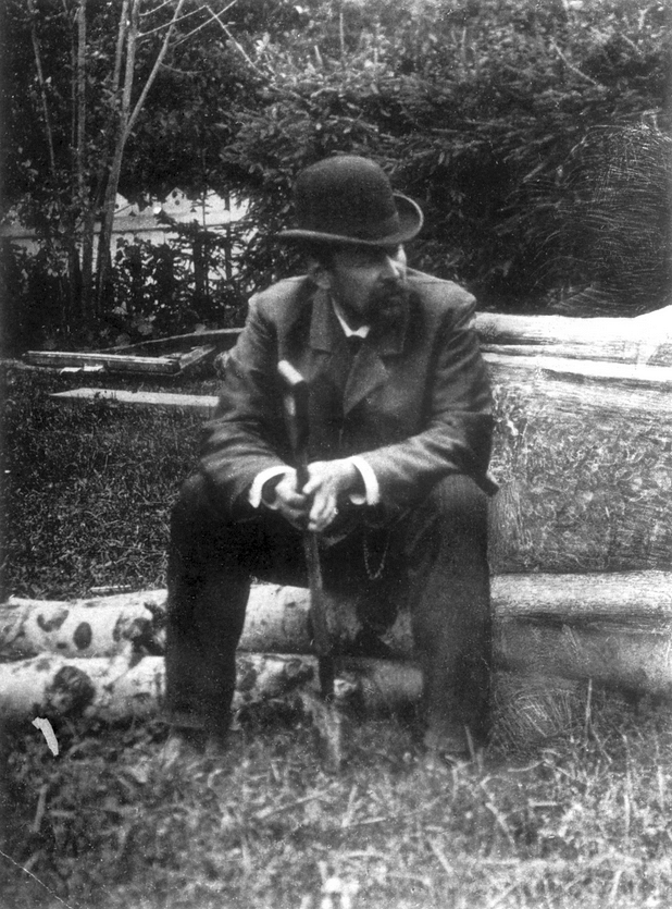 Это фотография философа Сергея Николаевича Трубецкого, взята из книги «Собрание сочинений Кн. Сергея Николаевича Трубецкого. Том I. Публицистические статьи, напечатанные с 1896г. по 1905г. включительно», опубликованой в 1907 году